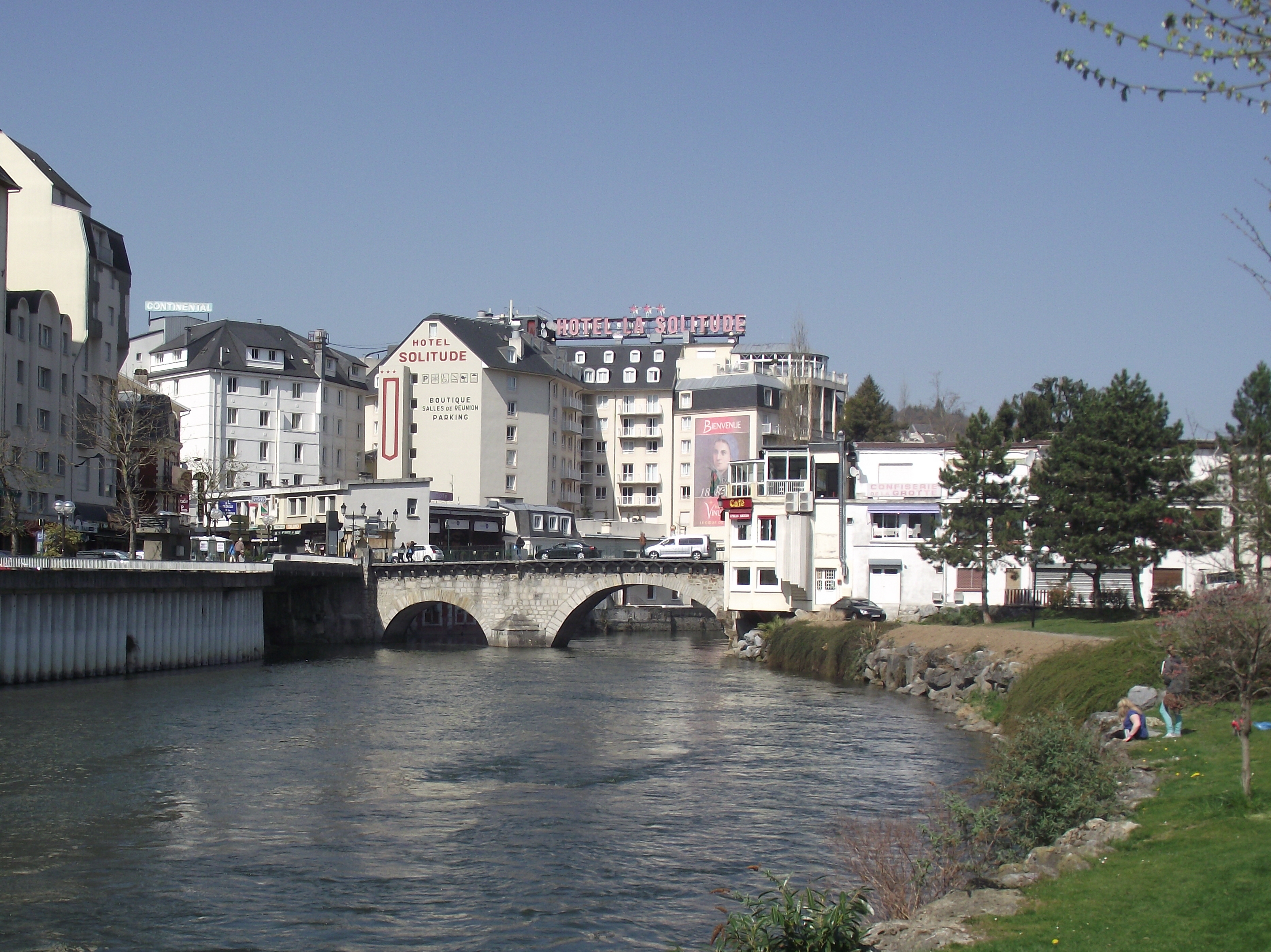 Pont Vieux (Lourdes, Hautes-Pyrénées, France)